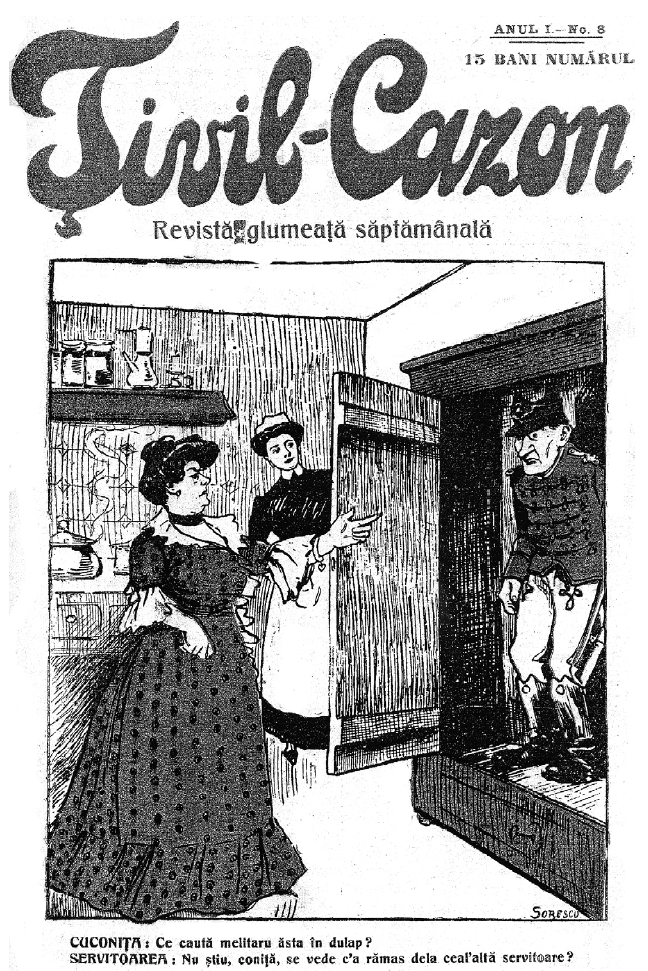 O explicație ciudată. Țivil-Cazon, nr. 8 / 1906.Cuconița: Ce caută melitaru ăsta în dulap?Servitoarea: Nu știu, coniță, se vede c'a rămas de la ceal'altă servitoare ?